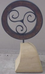 Trophée "Marcel Thesson" du champion de Bretagne de Football Gaélique